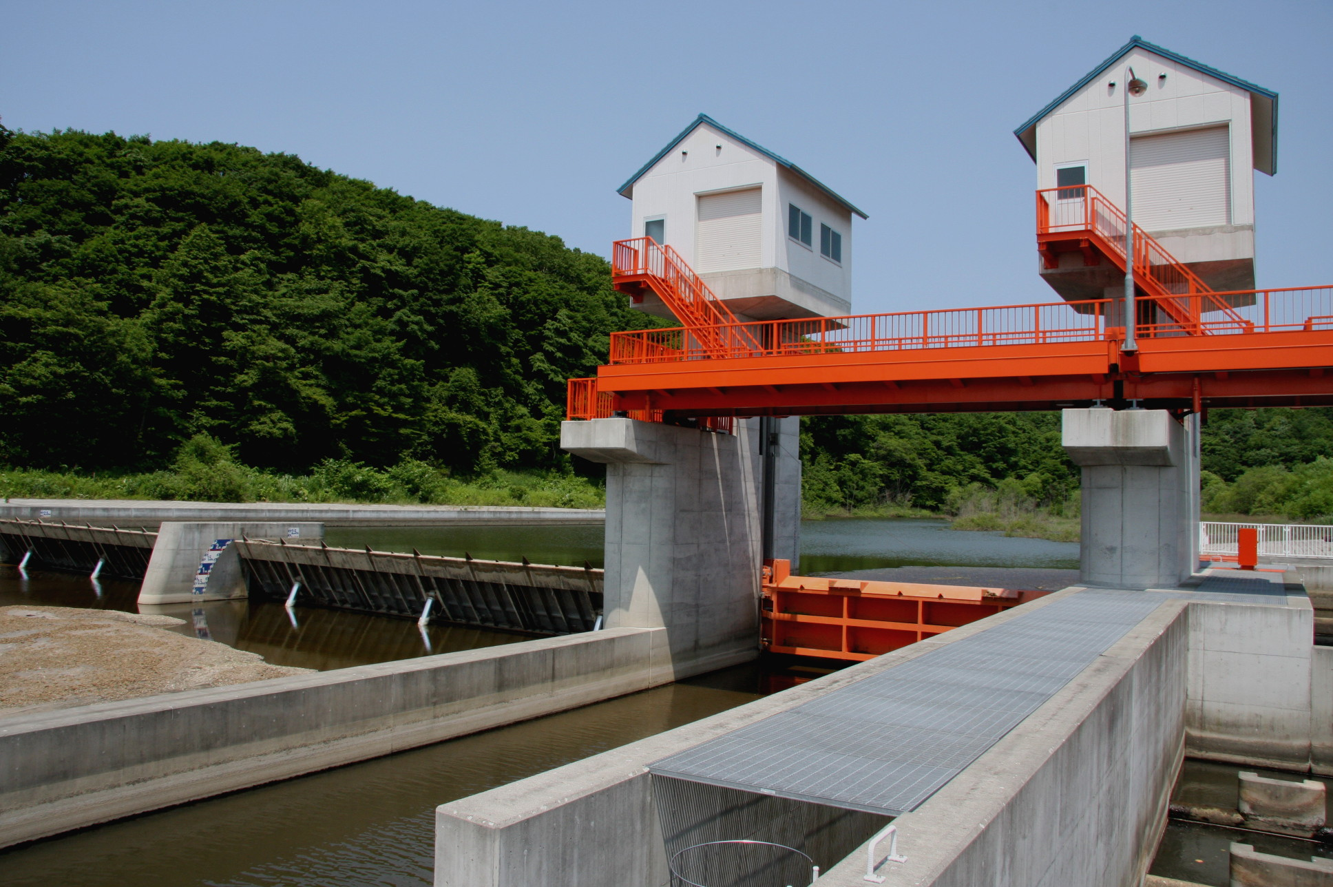 厚真川 美里頭首工（厚真町美里）